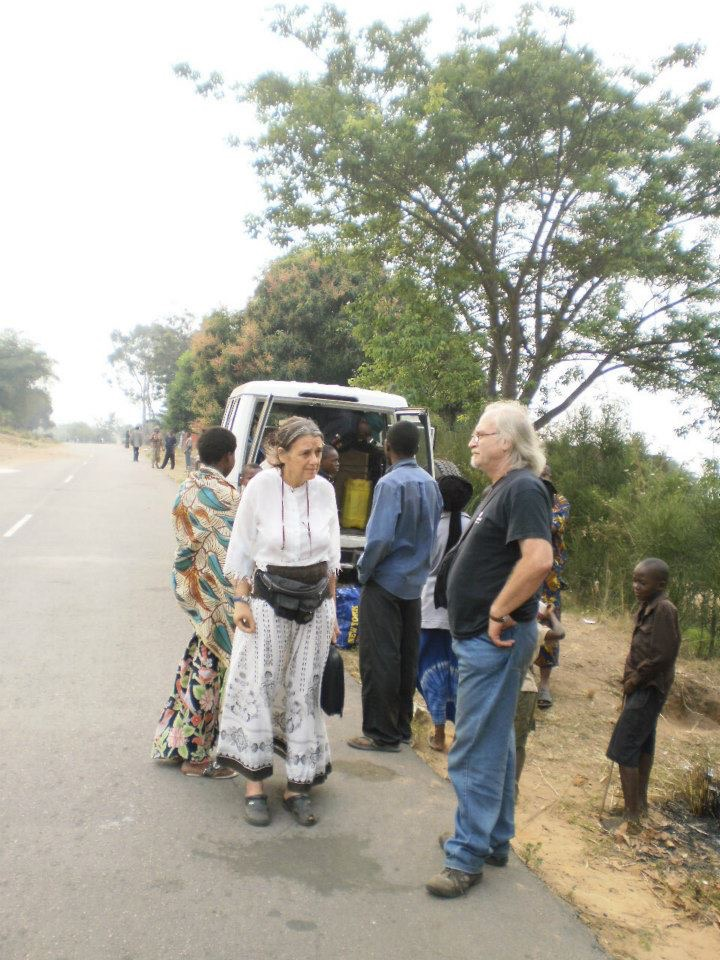 Chiara Castellani si prepara a partire per Kimbau con lo scopo di seguire il collegamento via satellite dell'ospedale